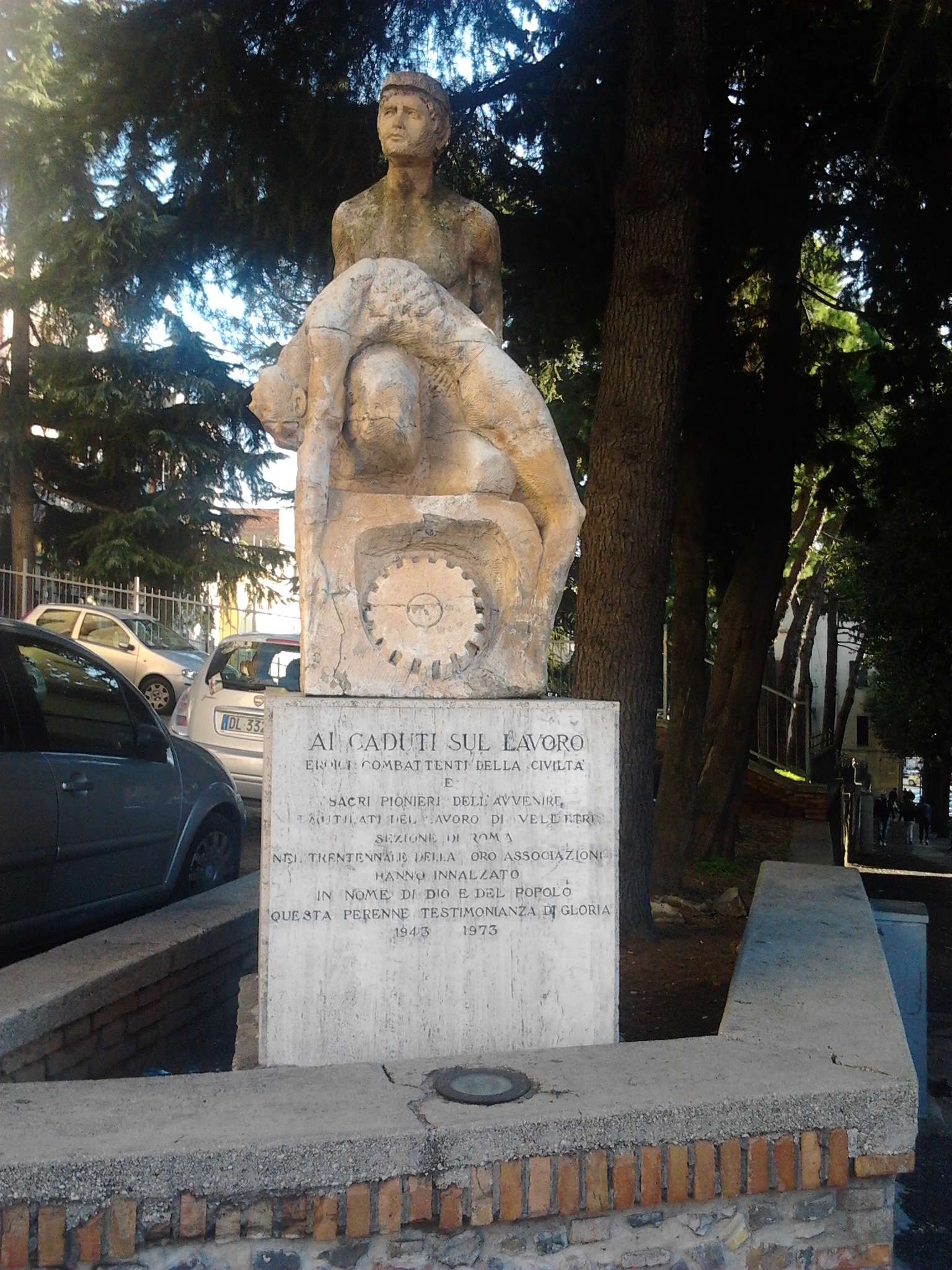 Monumento ai caduti sul lavoro presso Velletri